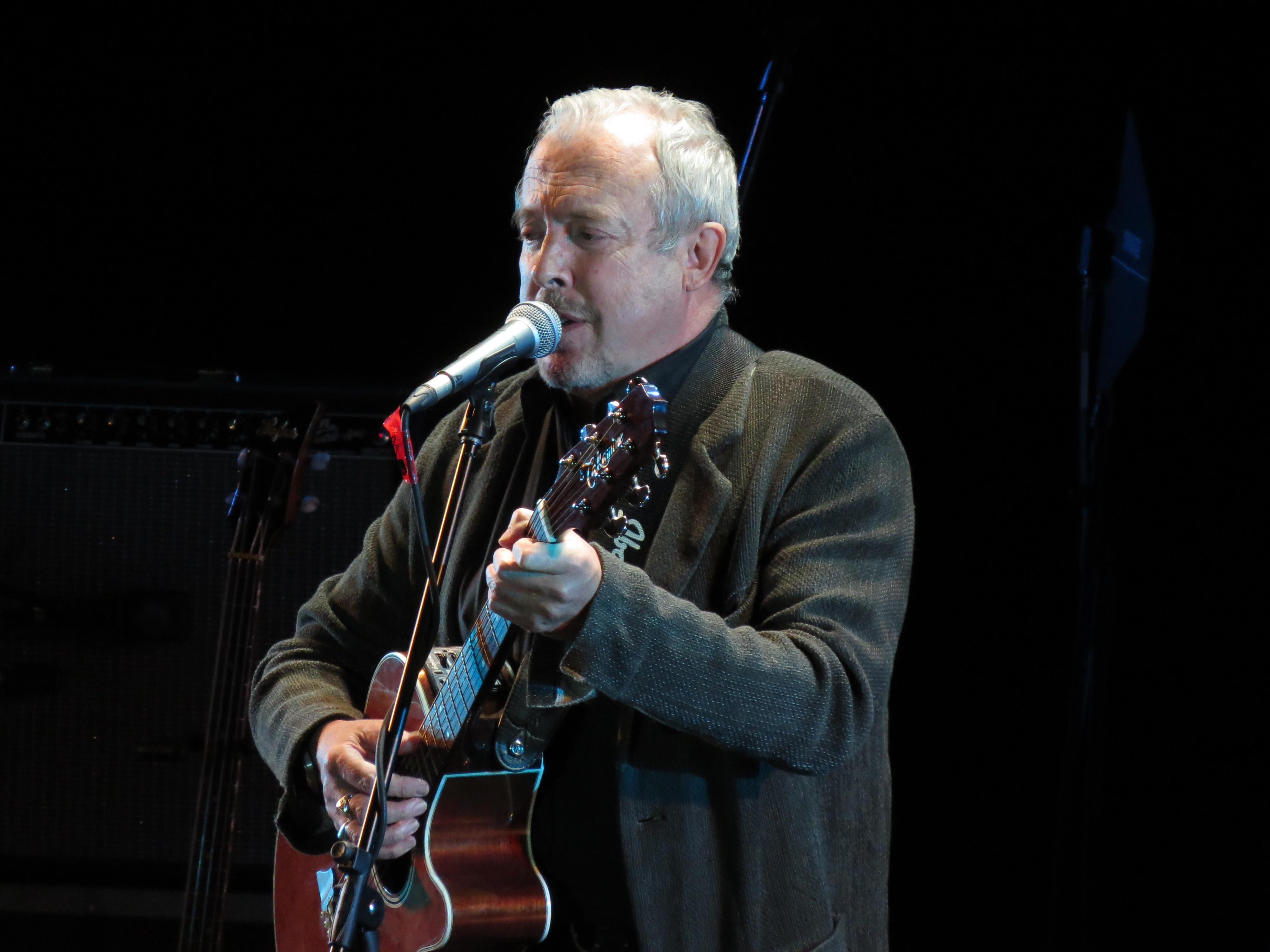 Благотворительный концерт «#РокУзник» в поддержку «узников 6 мая» в ТКЗ «Мир» 22 сентября 2013 года.